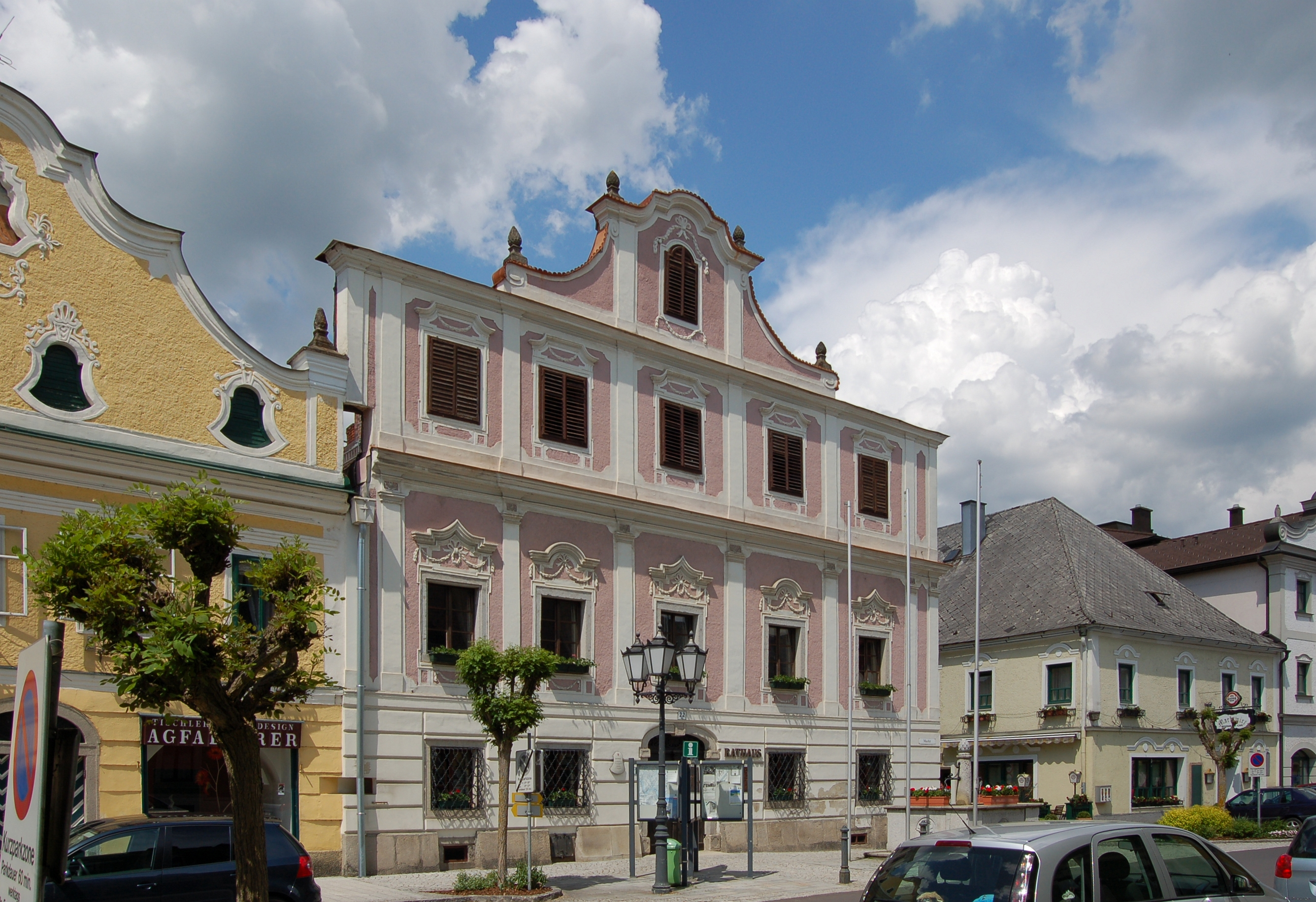 Das denkmalgeschützte Gebäude am Markt 22 in Neufelden in Oberösterreich (Bezirk Rohrbach).